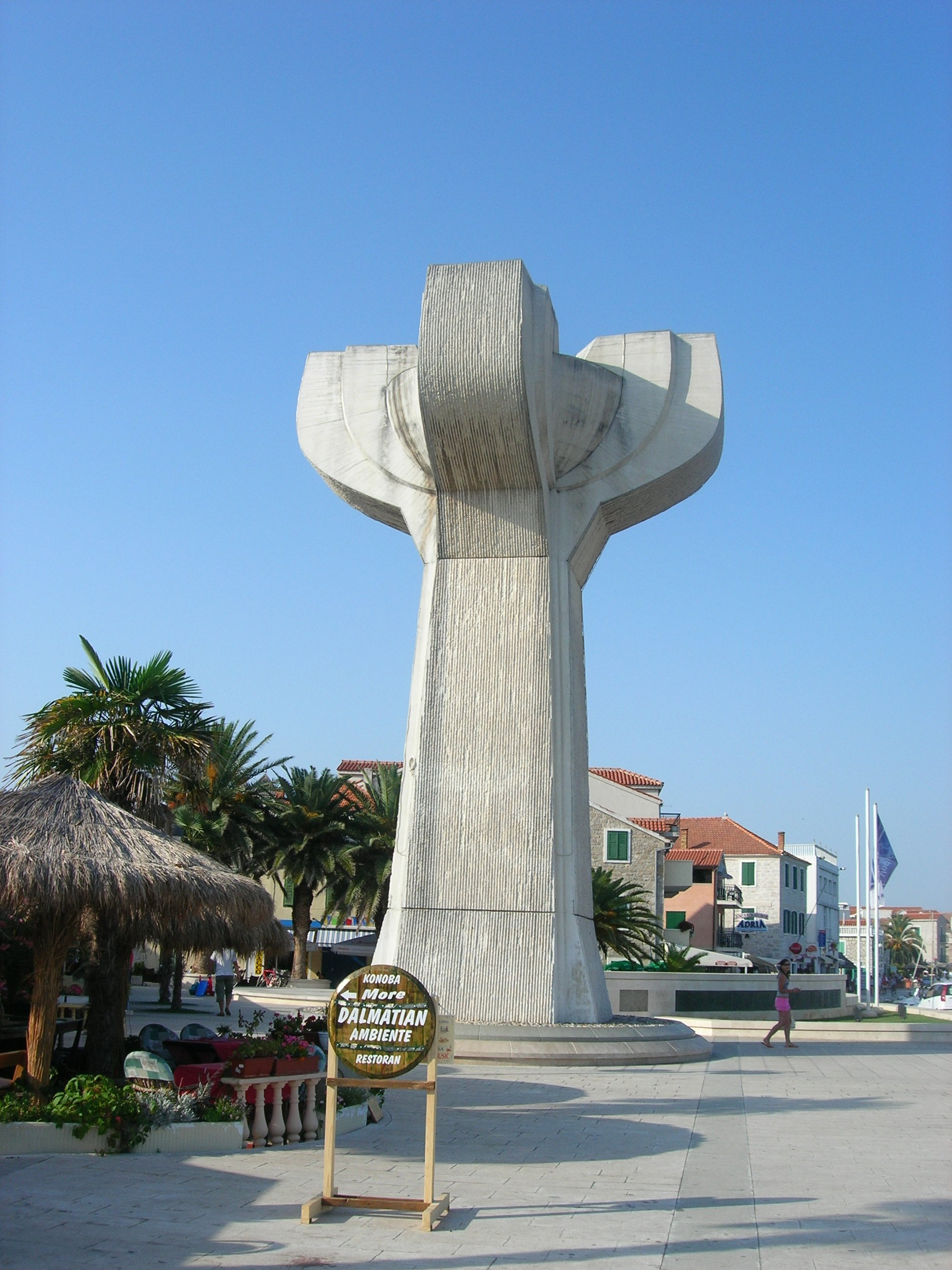 Monument (WW2) in Vodice, Croatia